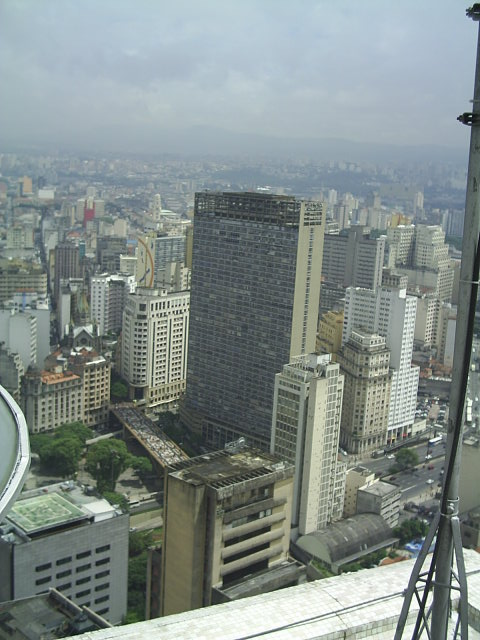 Mirante do Vale no centro de São Paulo.